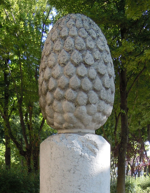 Castel Goffredo, monumento "La Pigna", segnacolo funebre romano.